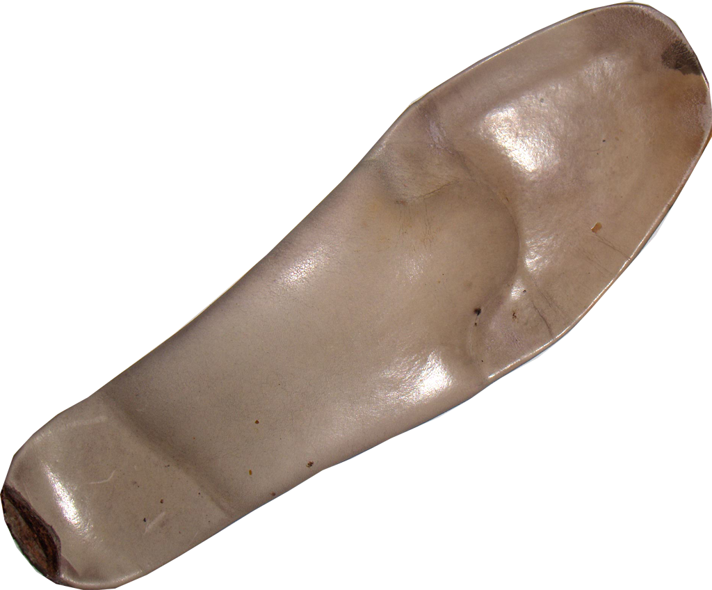 una plantilla